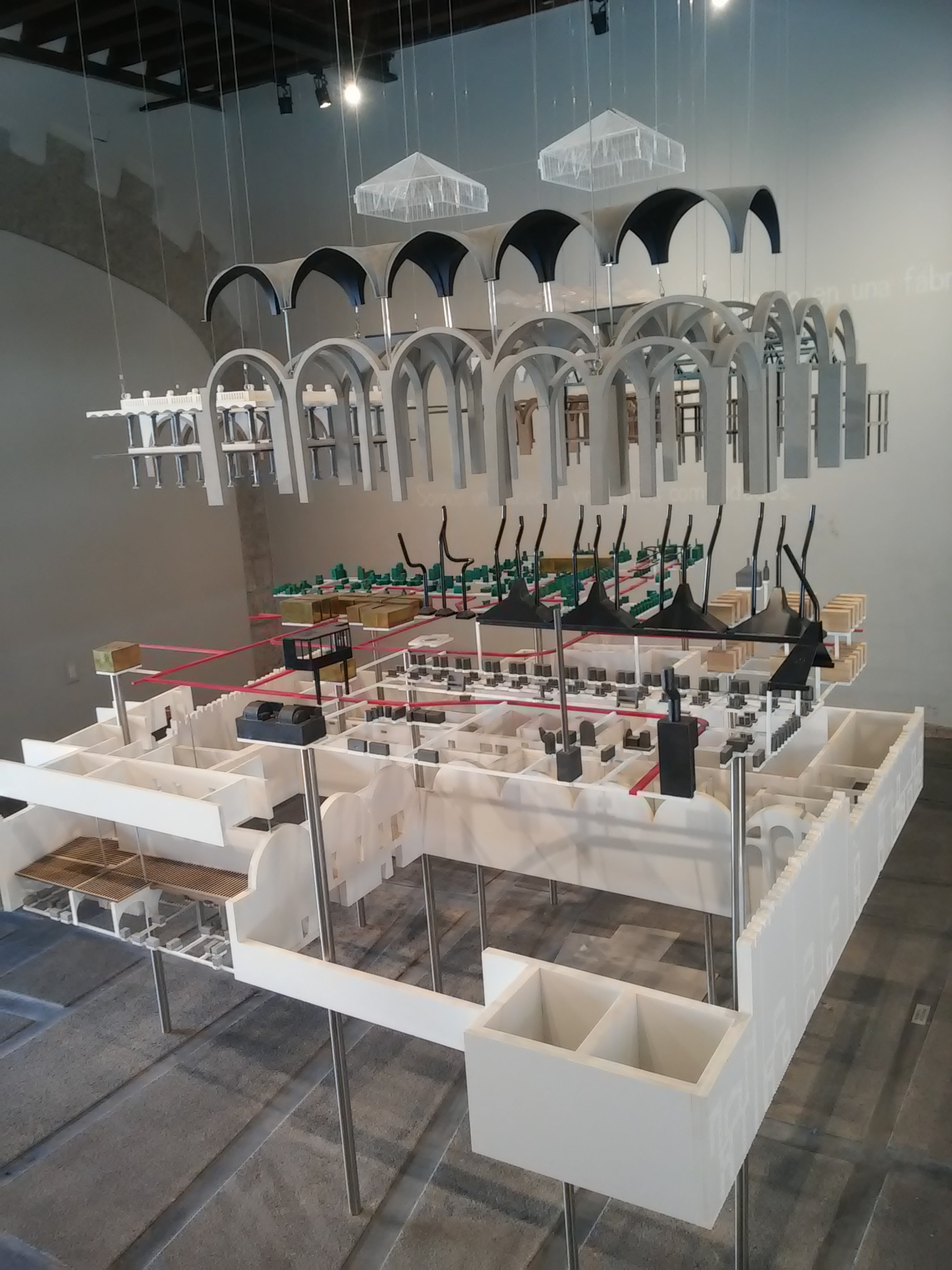 Maqueta del muso numismático nacional en la Ciudad de México